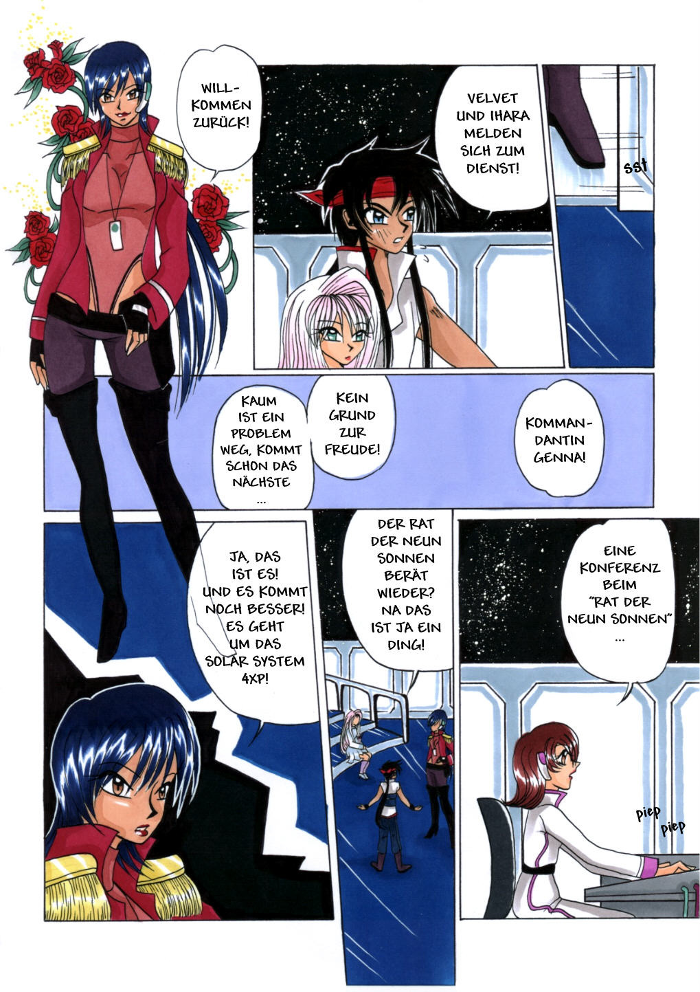 3. Platz des Wikipedia-Wettbewerbs bei Animexx in der Kategorie Erzählstruktur.